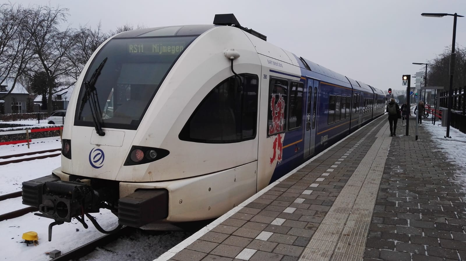 Station Cuijk 2018